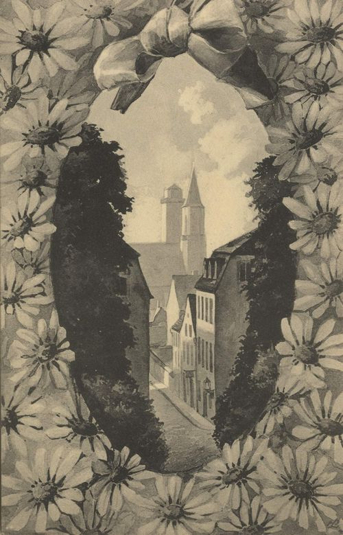 Ansichtskarte aus Zittau um 1900 zum Margeritentag